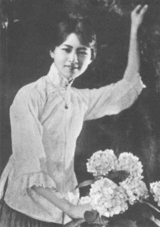 林徽因（1904—1955年） 《人比花秀》